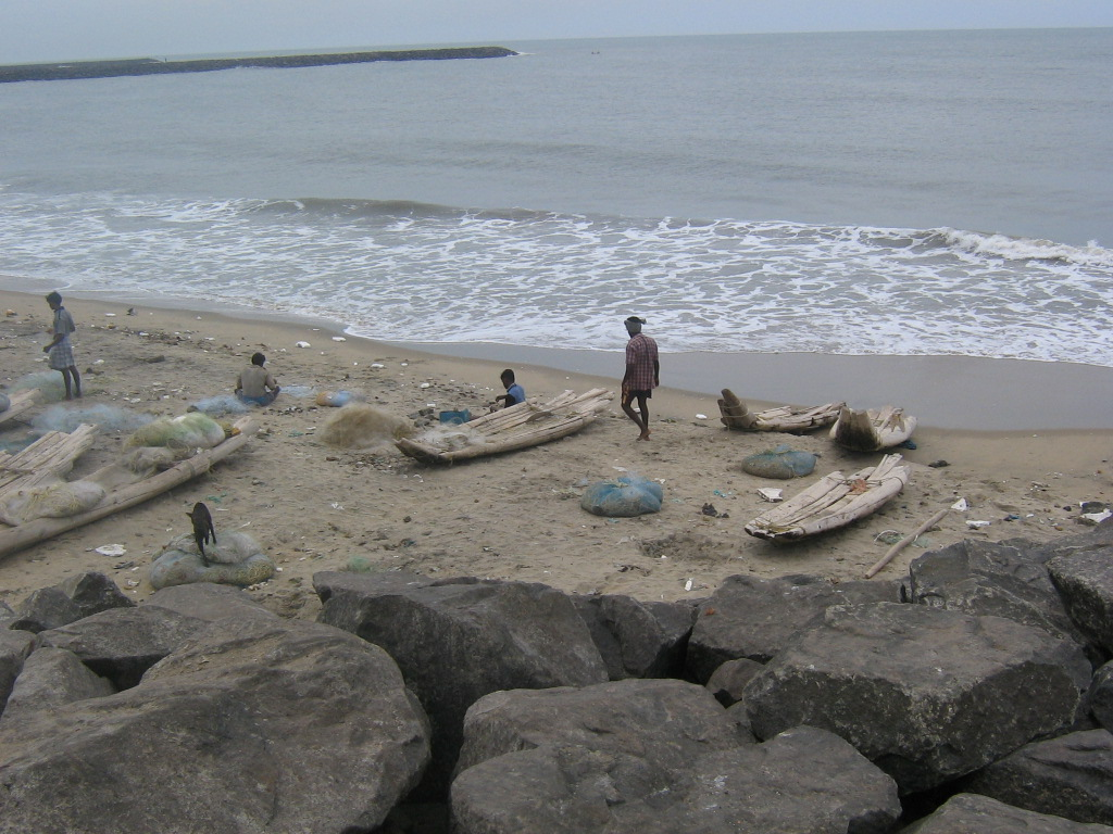 Catamaran